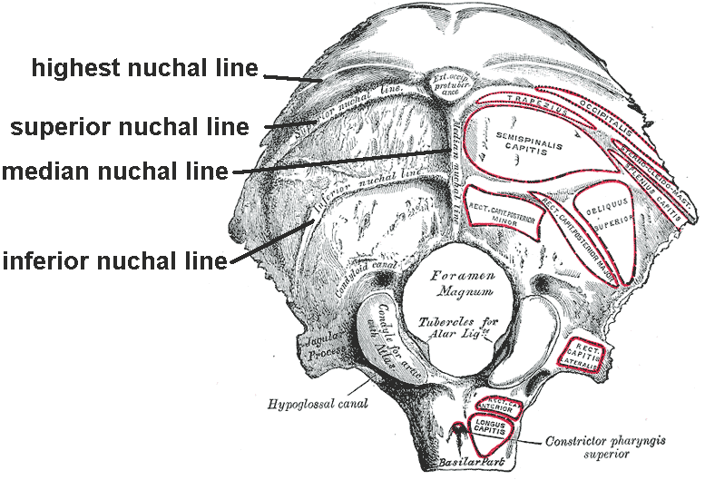 Nuchal lines